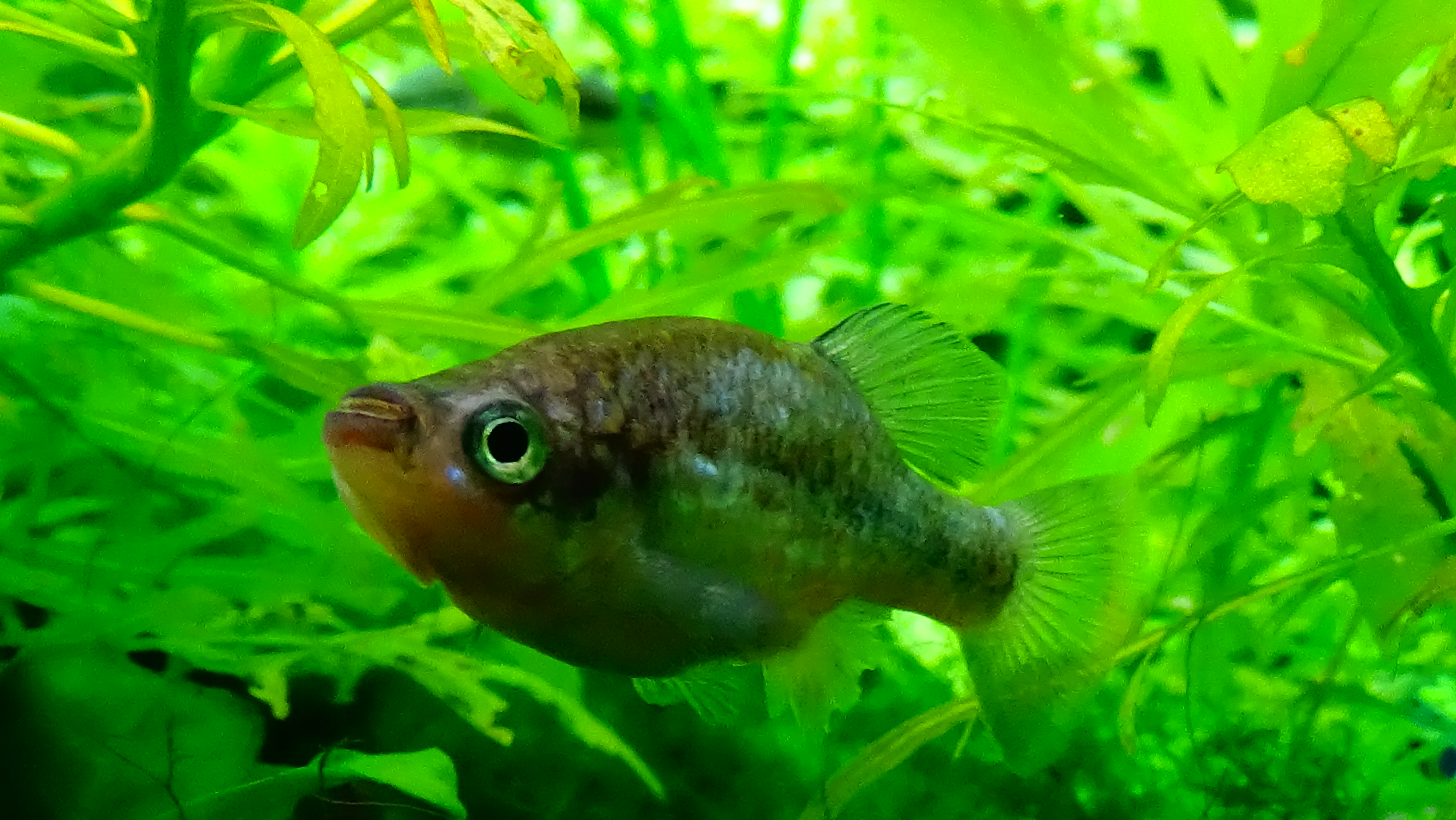 Xenoophorus captivus - Aquarium Tropical du Palais de la Porte Dorée Paris/France - 04/2015